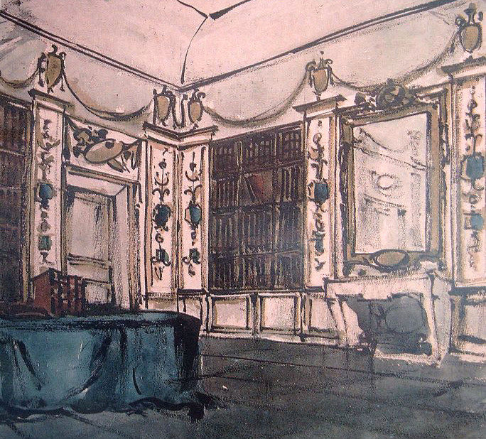 Biblioteka Stanisława Augusta rysunek pochodzi z J. Łojek Stanisław August Poniatowski i jego czasy